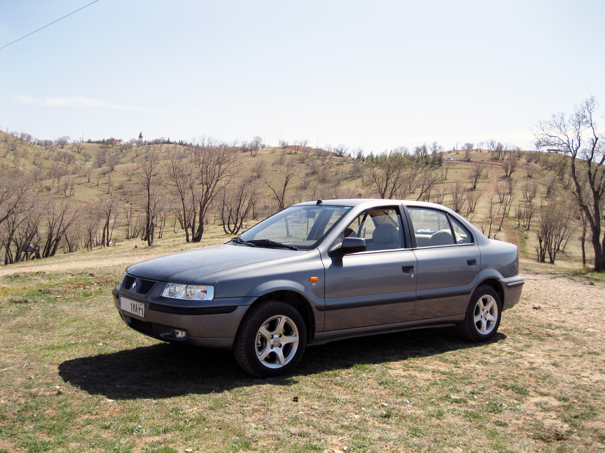 سمند ال ایکس مدل 1390، پارک جنگلی شوراب خرم‌آباد